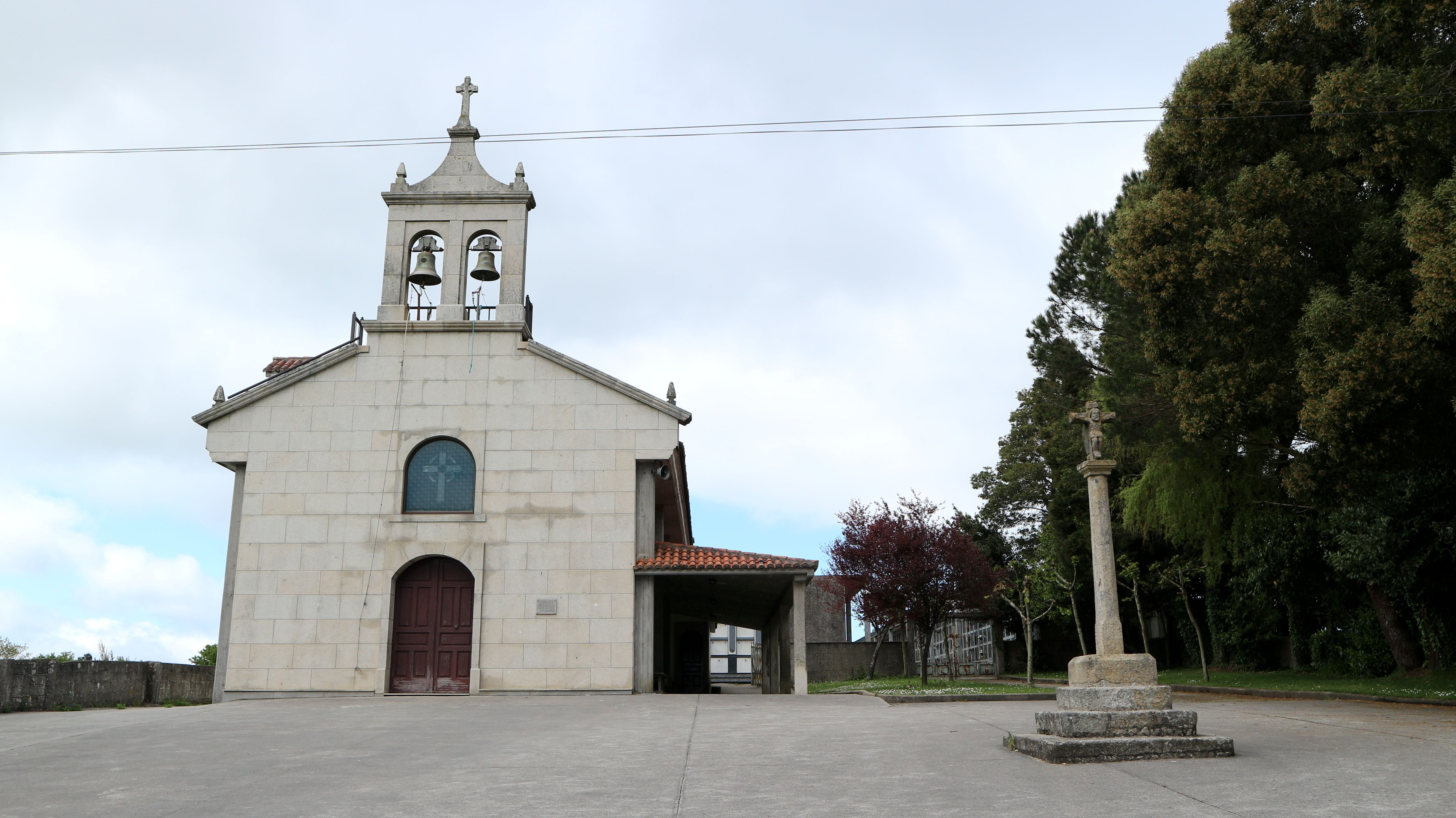 Igrexa do Mesón do Vento. O Mesón do Vento, Ardemil, Ordes.